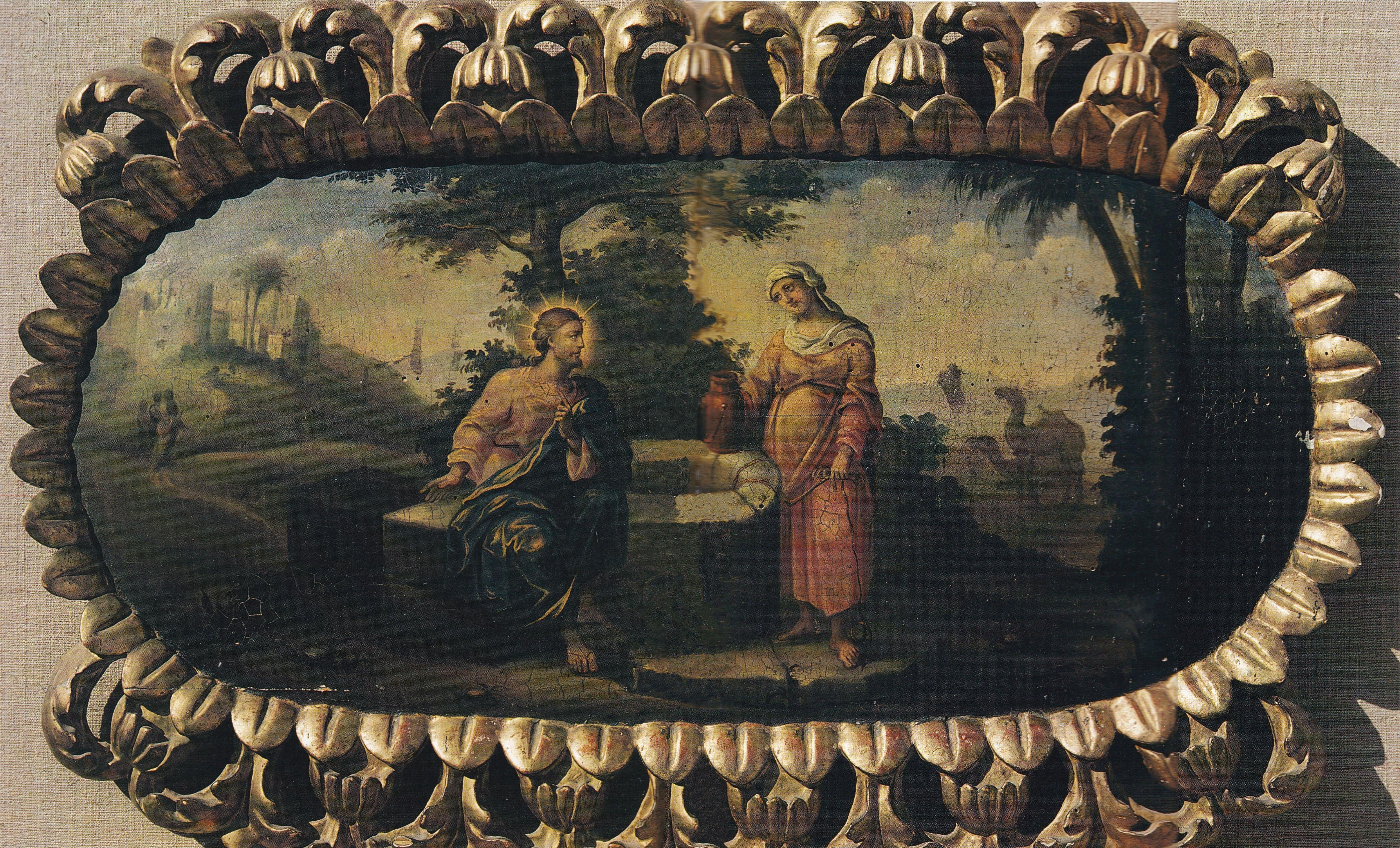 Nicolae Grigorescu - Mănăstirea Căldărușani - Isus și samarineana